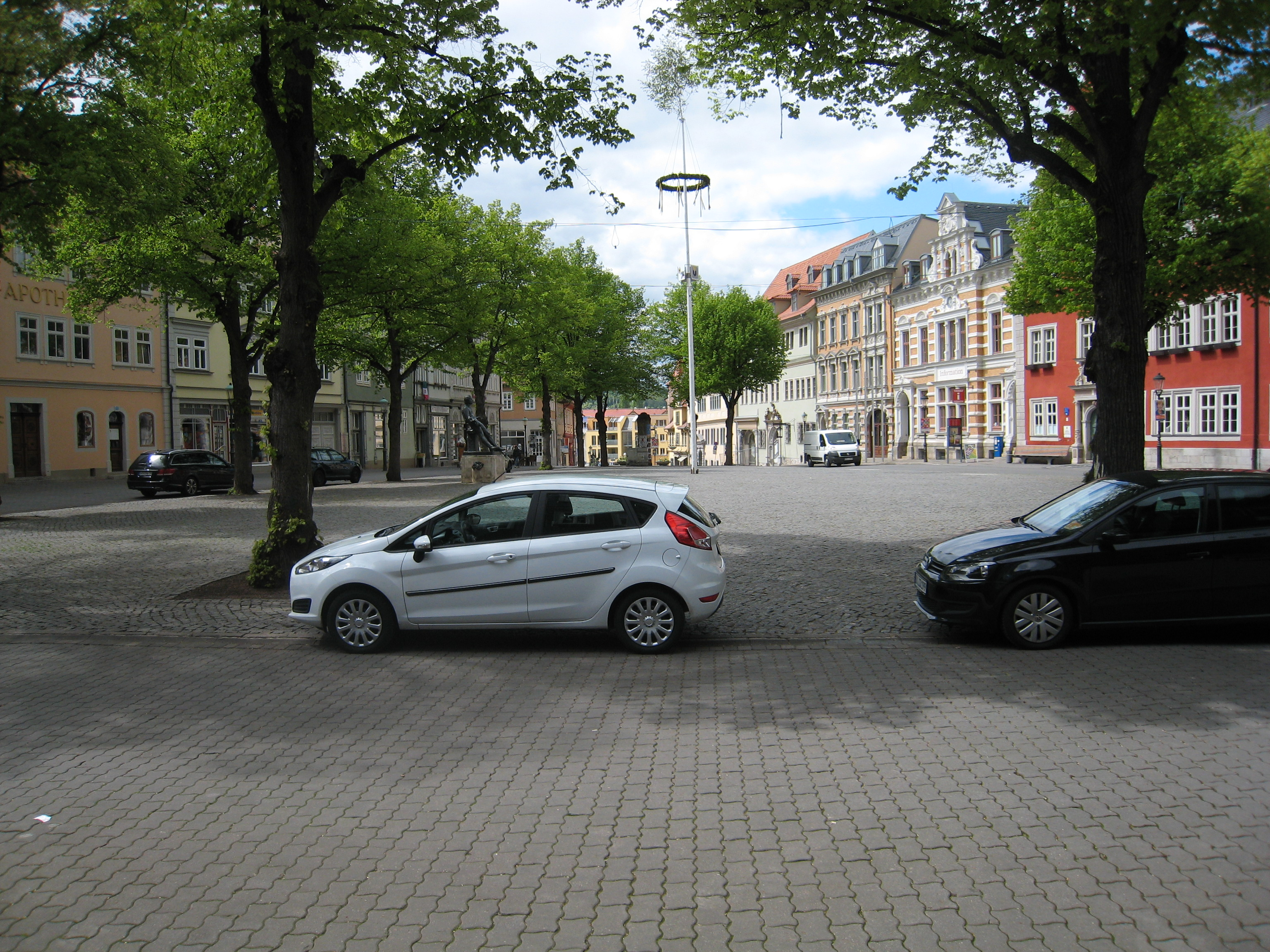 Marktplatz in Arnstadt; photopgraphiert von den sog. Galerien aus